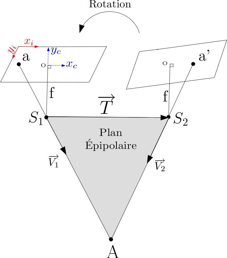 Géométrie fondamentale de la photogrammétrie